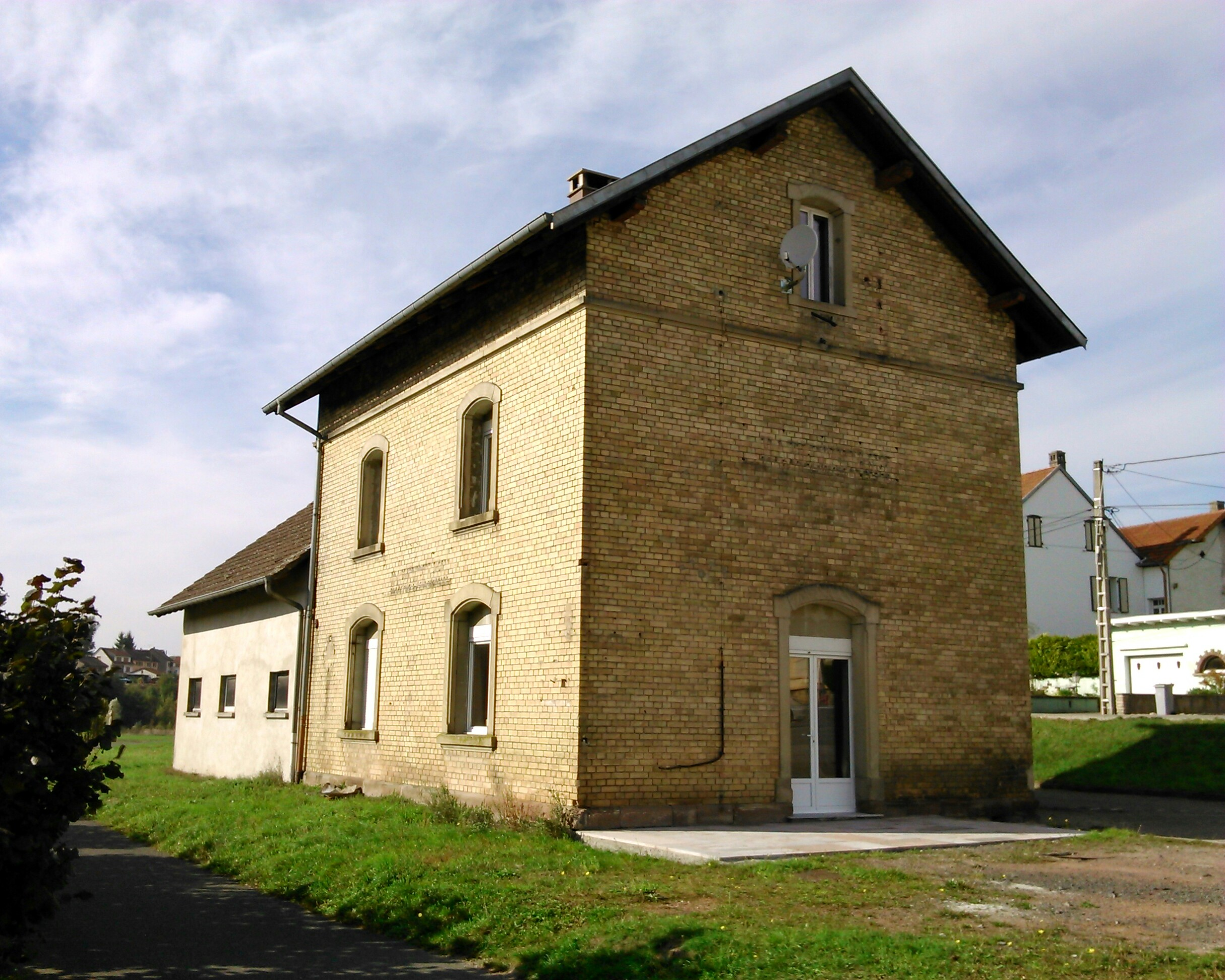 Ancienne gare d'Hartzviller.